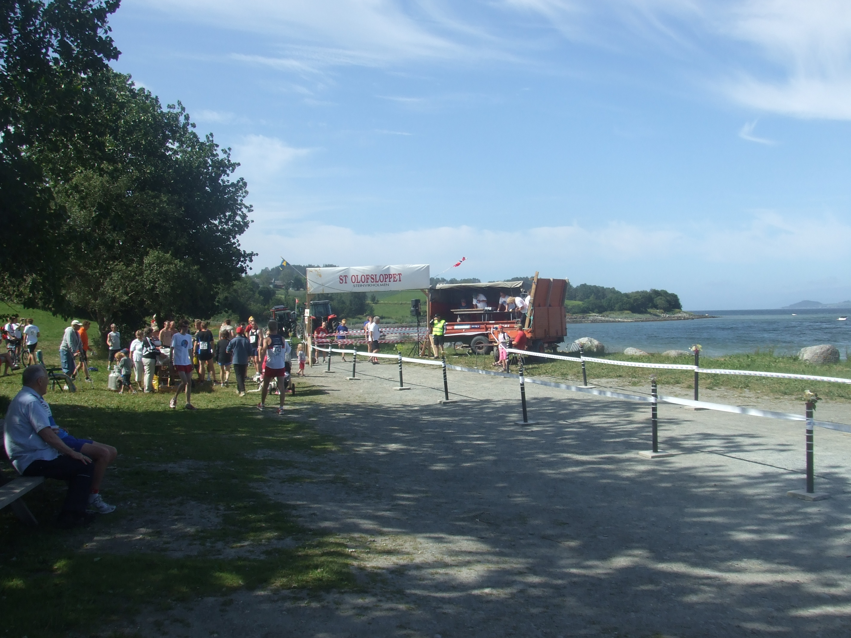 Veksling i St. Olavsloppet, her ved Steinvikholmen i Stjørdal kommune.